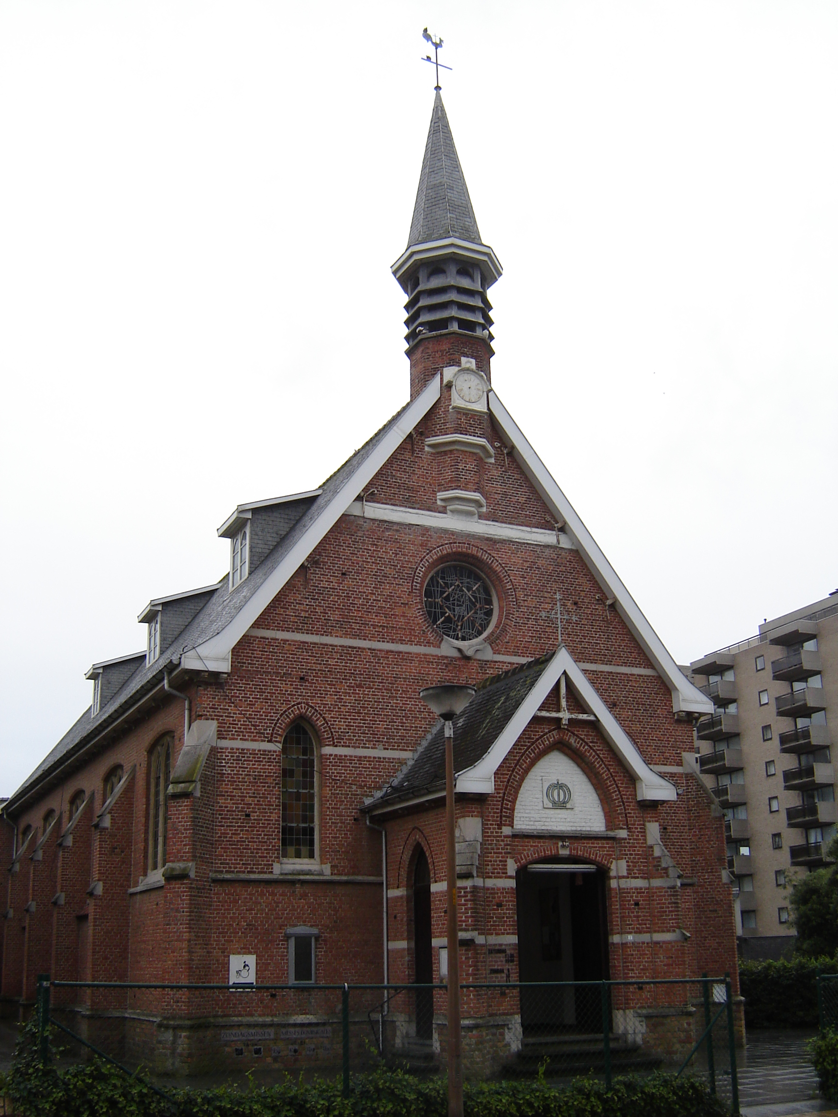 Kapel van de Paters Oblaten, ook wel Kapel Onze-Lieve-Vrouw-der-Zee of "koninklijke" kapel, in De Panne. Chapel of the Oblates, also known as Chapel of Our Lady of the Sea, or "royal" chapel, in De Panne. De Panne, West Flanders, Belgium